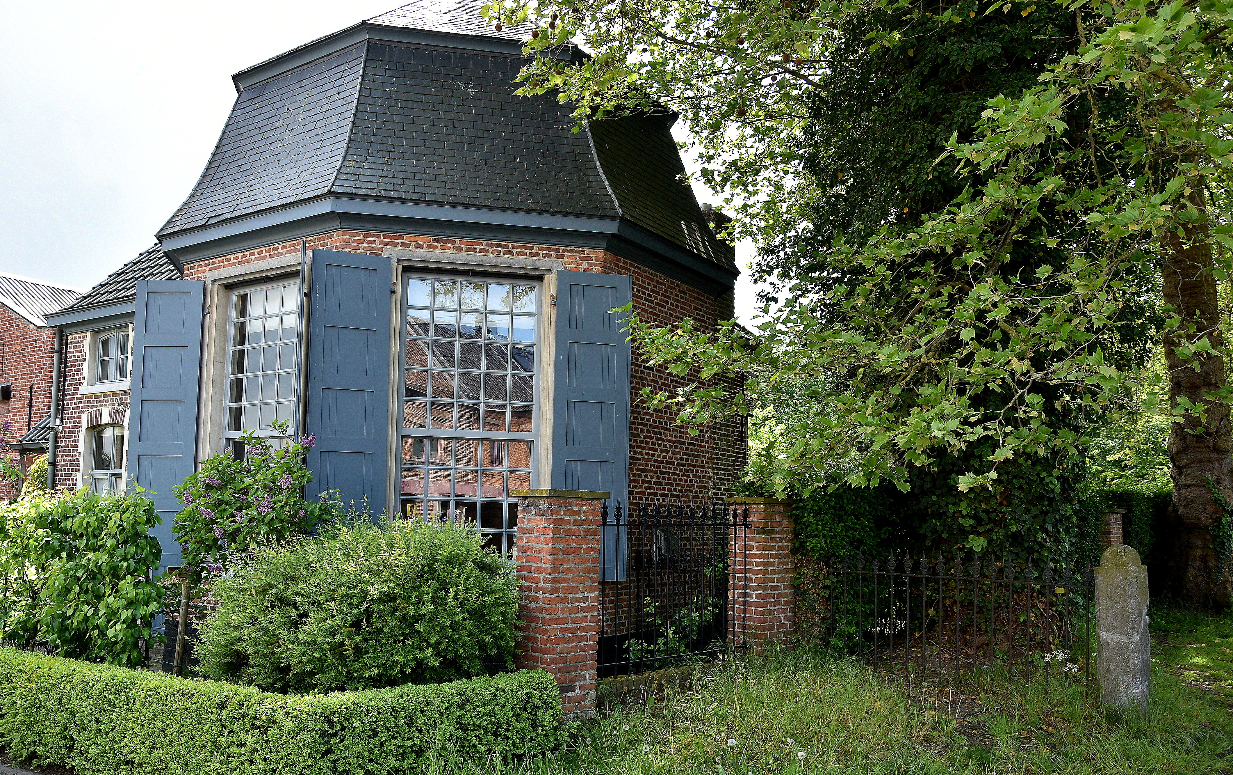 Kasteel de Bueren (Kwatrecht) - gloriëtte 10-05-2019 13-34-58